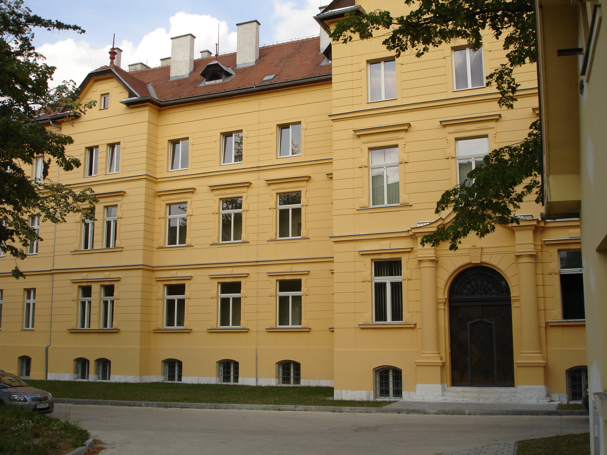 Bodova UPJŠ